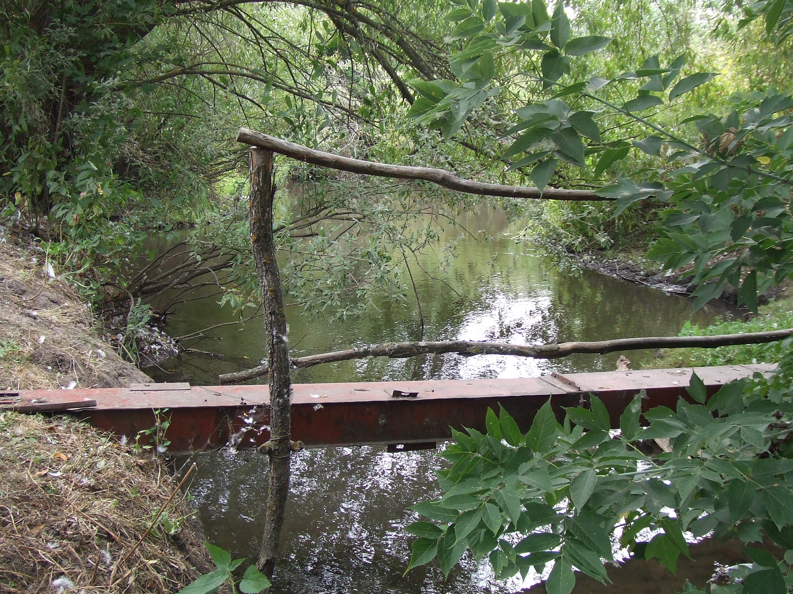 Вид на р. Реут в с. Нижний Реут